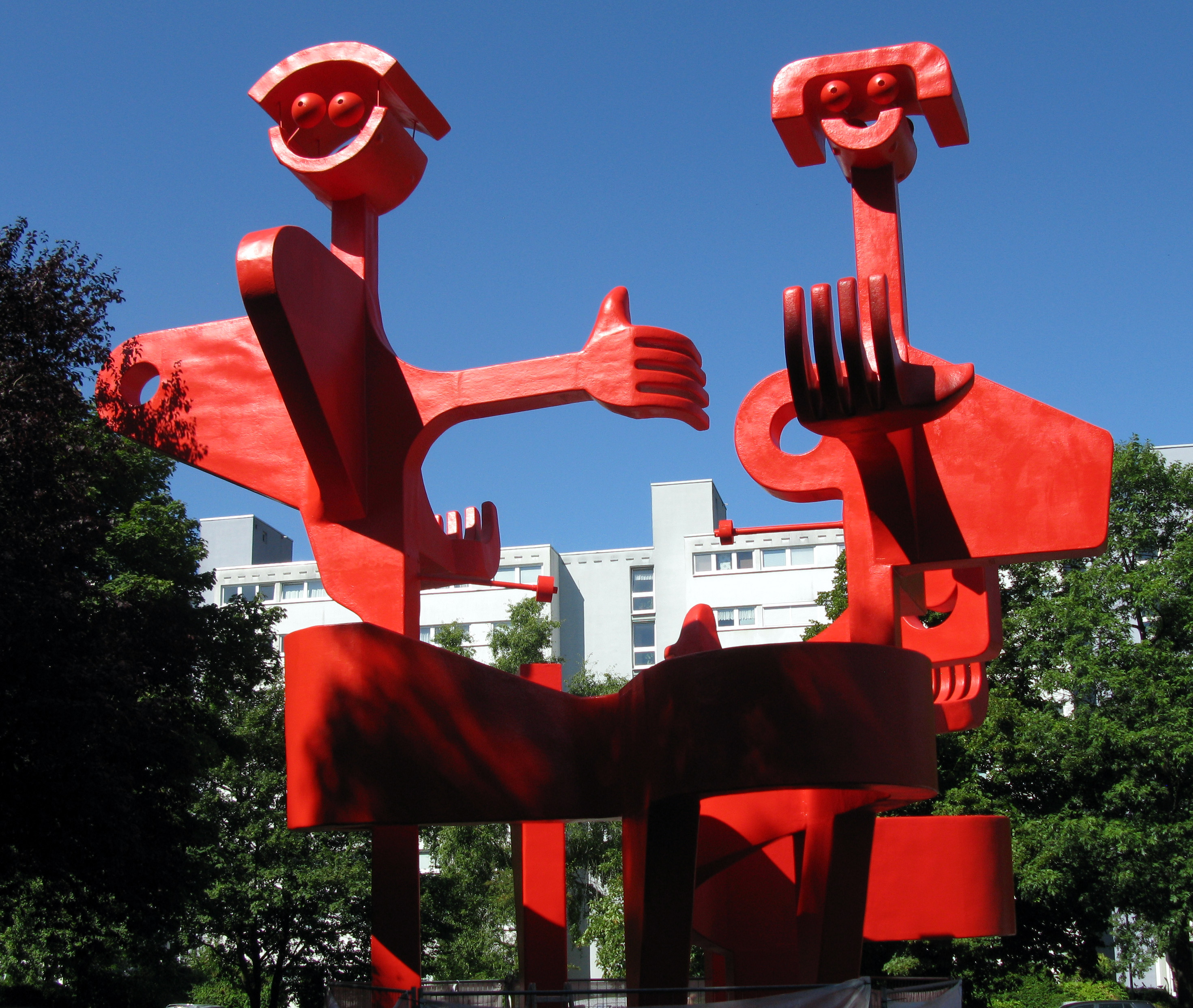 Roter Otto, kinetische Plastik von Eberhard Rau, 1973 in Freiburg-Landwasser, restauriert 2015